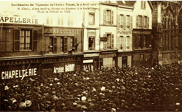 Gaston Cheq harangant la foule lors de la manifestation du 9 avril 1911